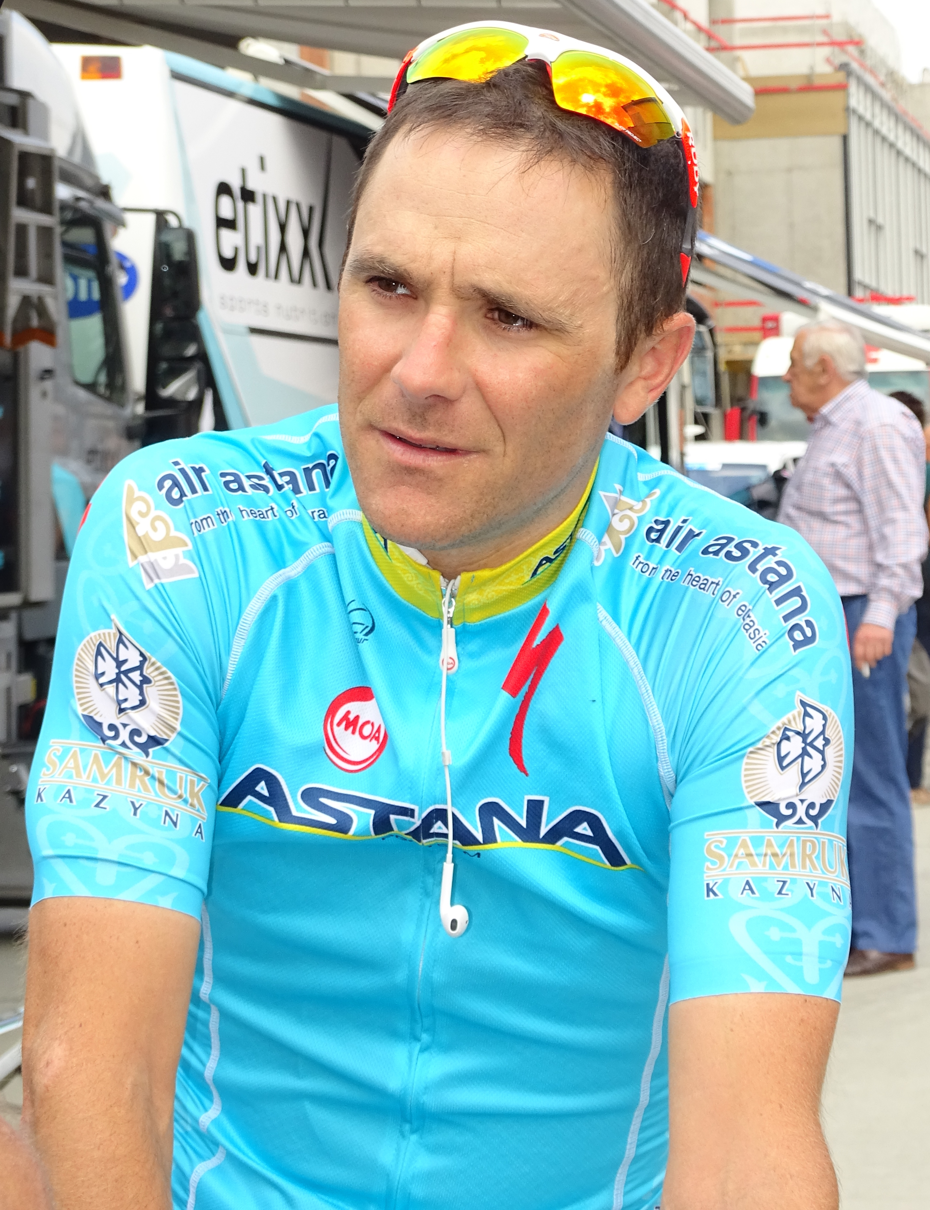 Reportage réalisé le mercredi 27 mai à l'occasion du prologue du Tour de Belgique 2015 à Bornem, Belgique.